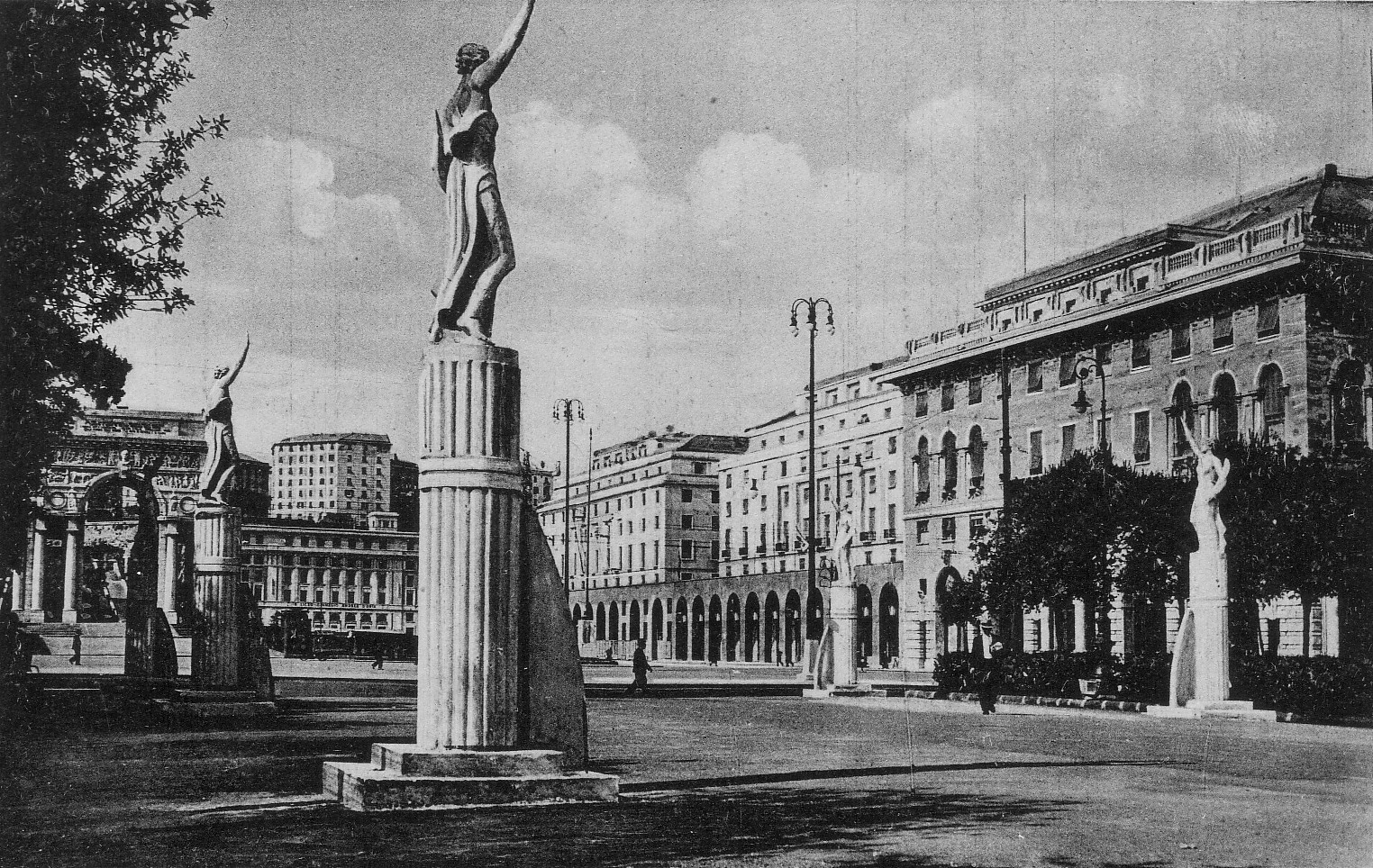 Genova piazza della Vittoria anni 30, fasci littori